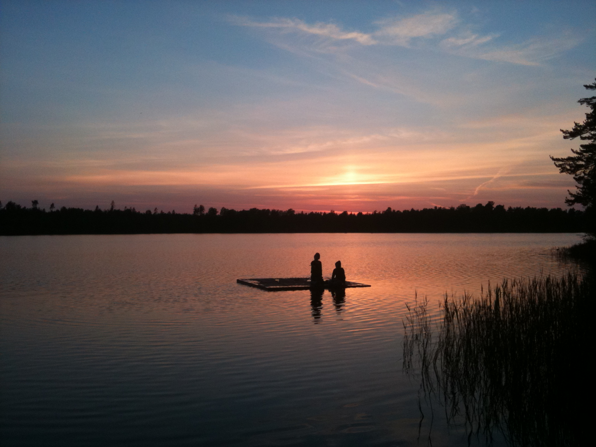 Utanför badplats i södra delen av Västersjön.